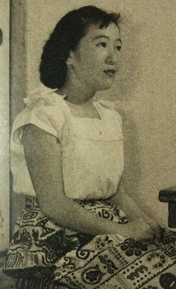 高橋和江